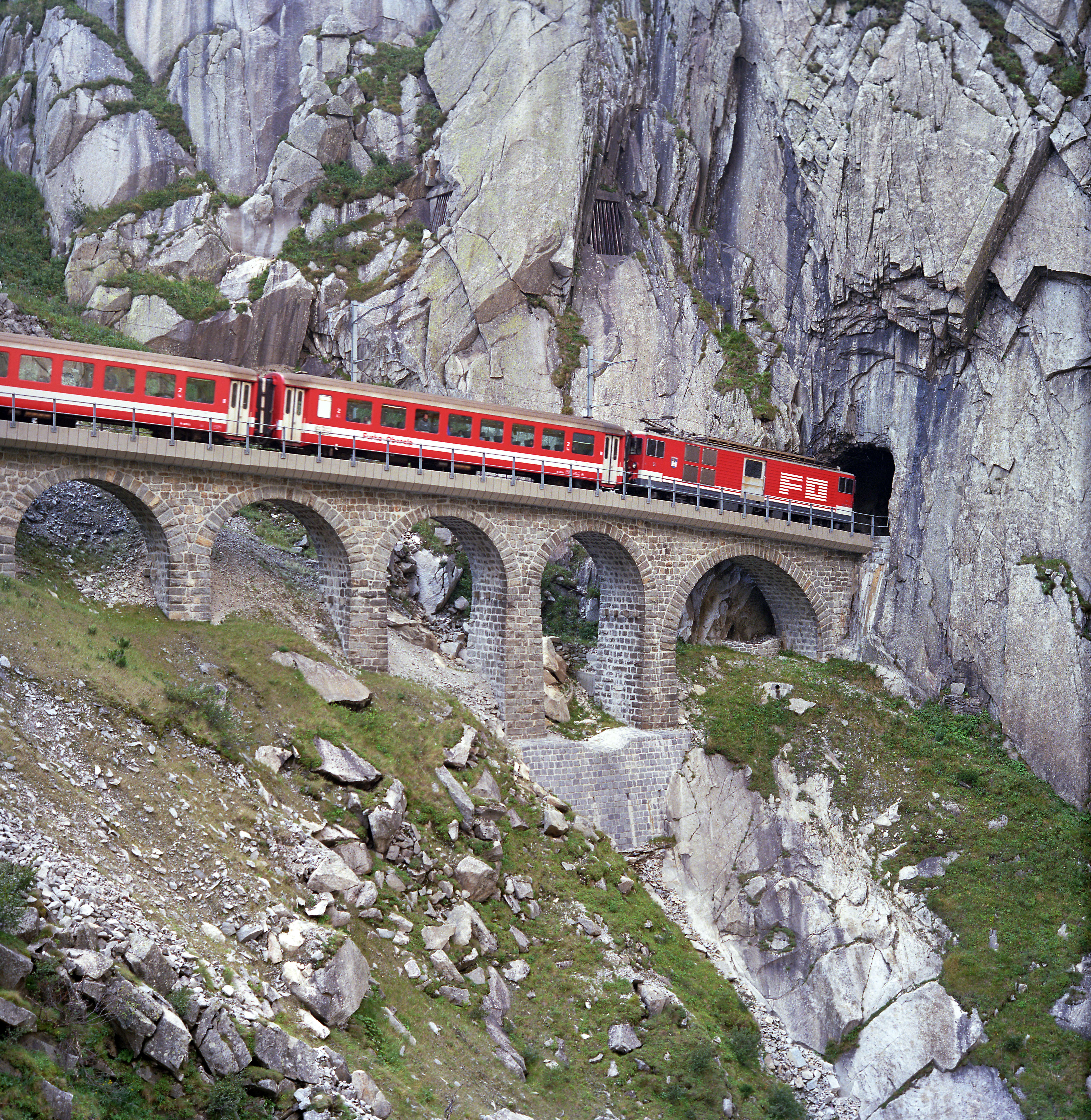 Regionalzug Andermatt–Göschenen in der Schöllenenschlucht